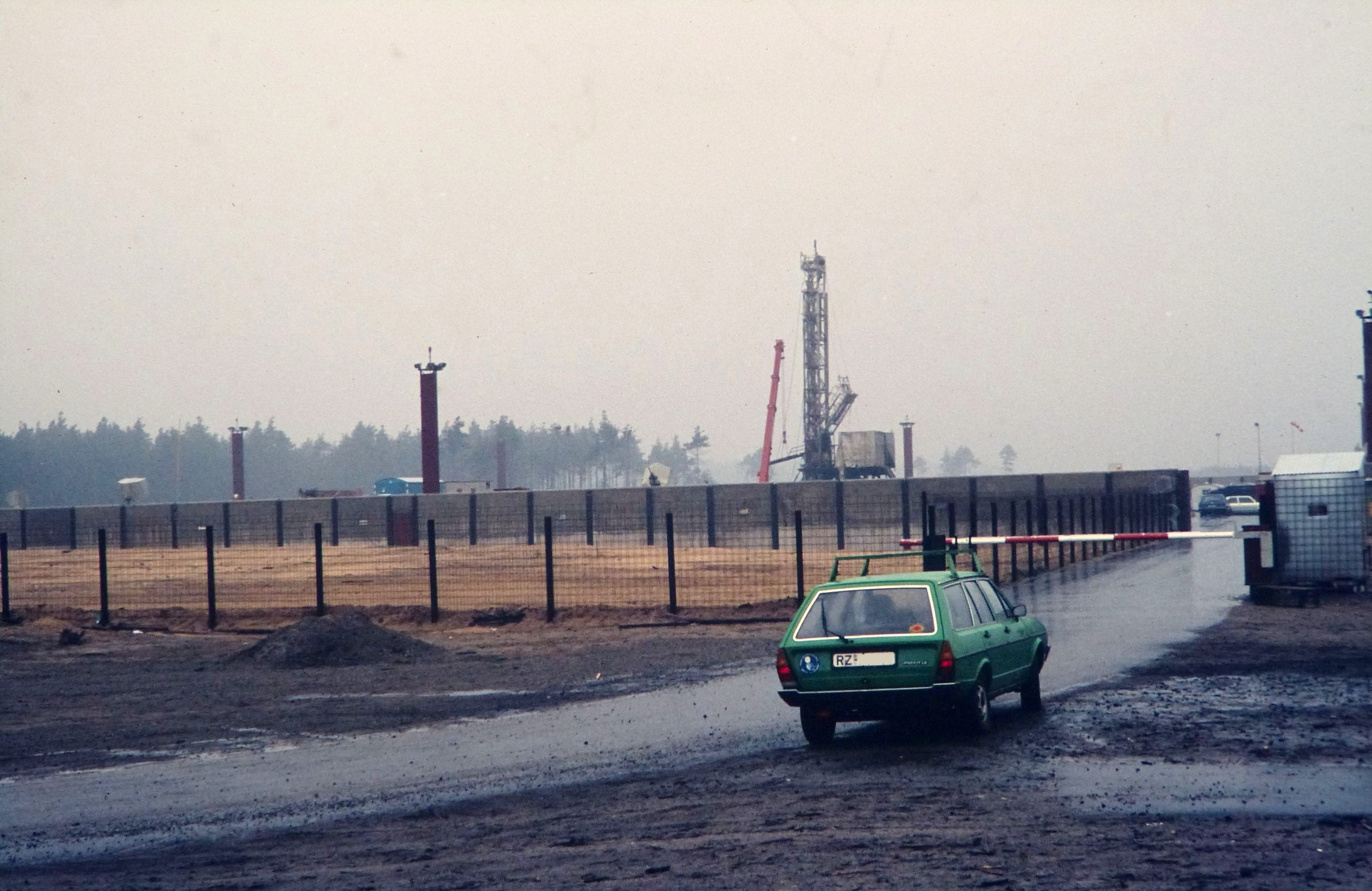 Baustelle zum Atommülllager in Gorleben wenige Tage nach der Räumung des Hüttendorfes der Demonstranten (Anmerkung: Das Bild zeigt vermutlich die Bohrstelle 1004, wo sich das Hüttendorf der Republik Freies Wendland befand)